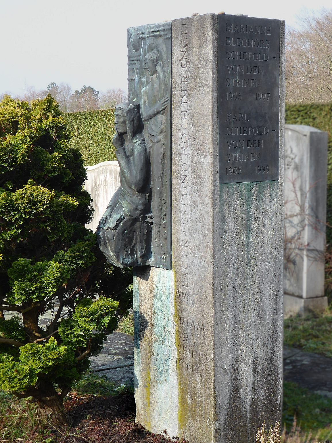 Karl Schefold-von den Steinen (1905–1999) Archäologe, Grab auf dem Friedhof Hörnli, Riehen, Basel-Stadt